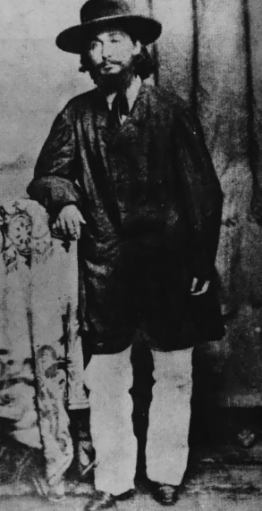 A young Ramón Emeterio Betances.